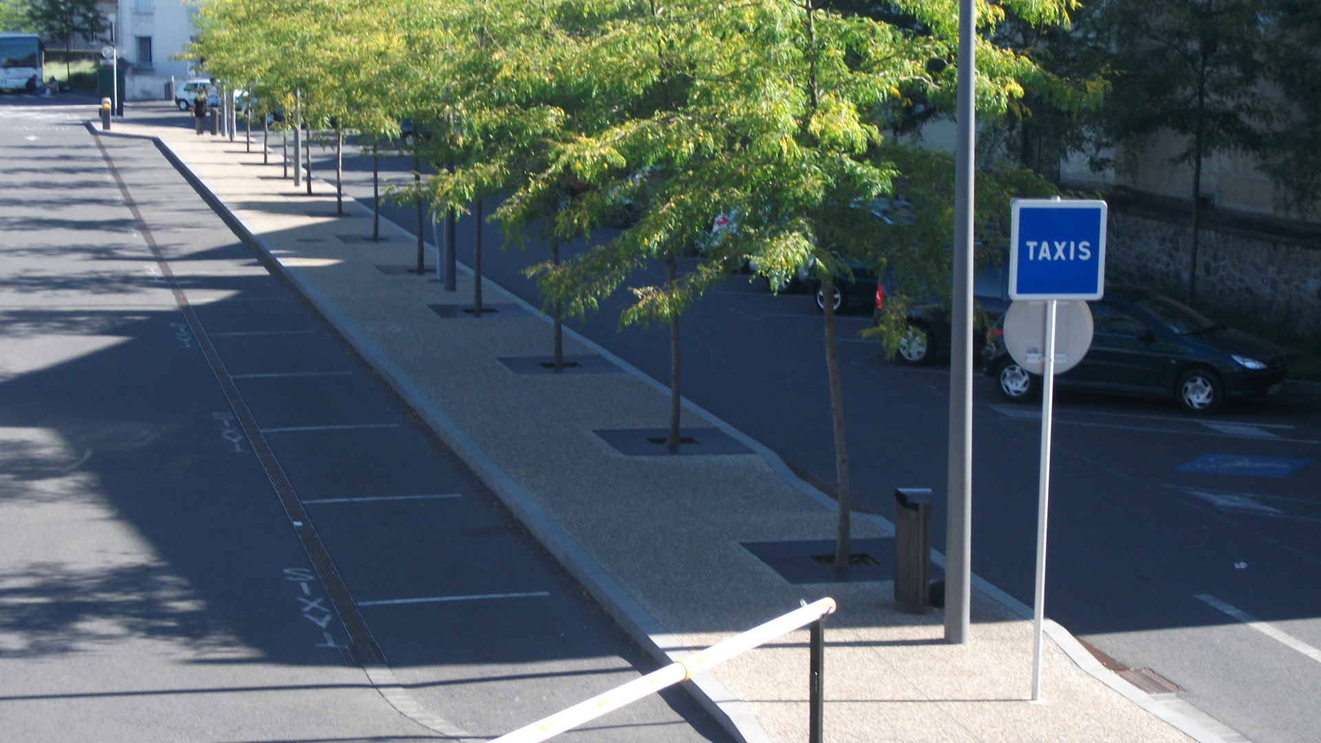 Station de taxis de la gare routière (détail). Un panneau (C5, CRAPIE S.A., 2008, gamme normale) est placé à la fin de la zone réservée.